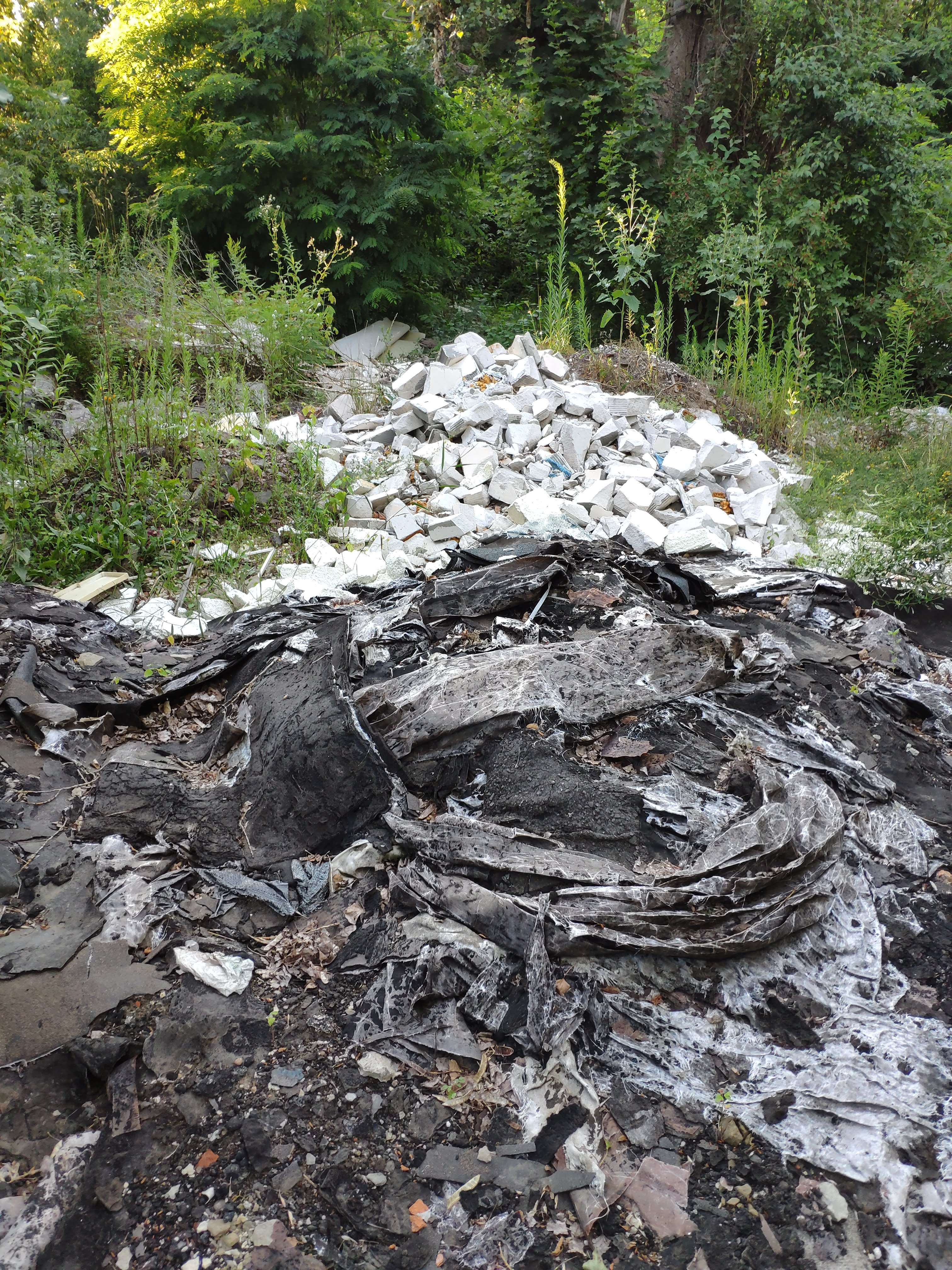 Артилерійські склади будівельне сміття